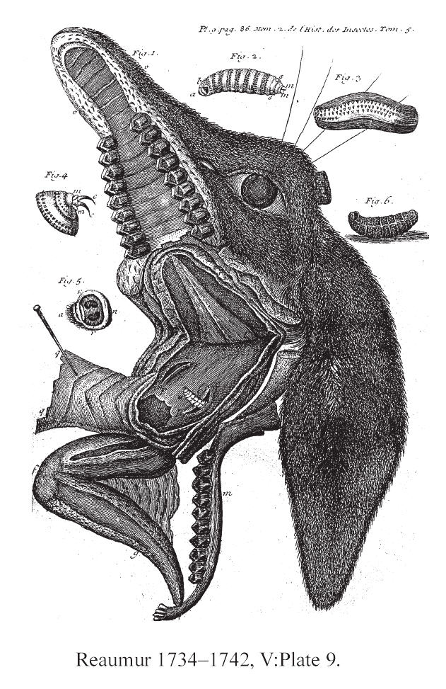 Deer Bot flies in deer dissection